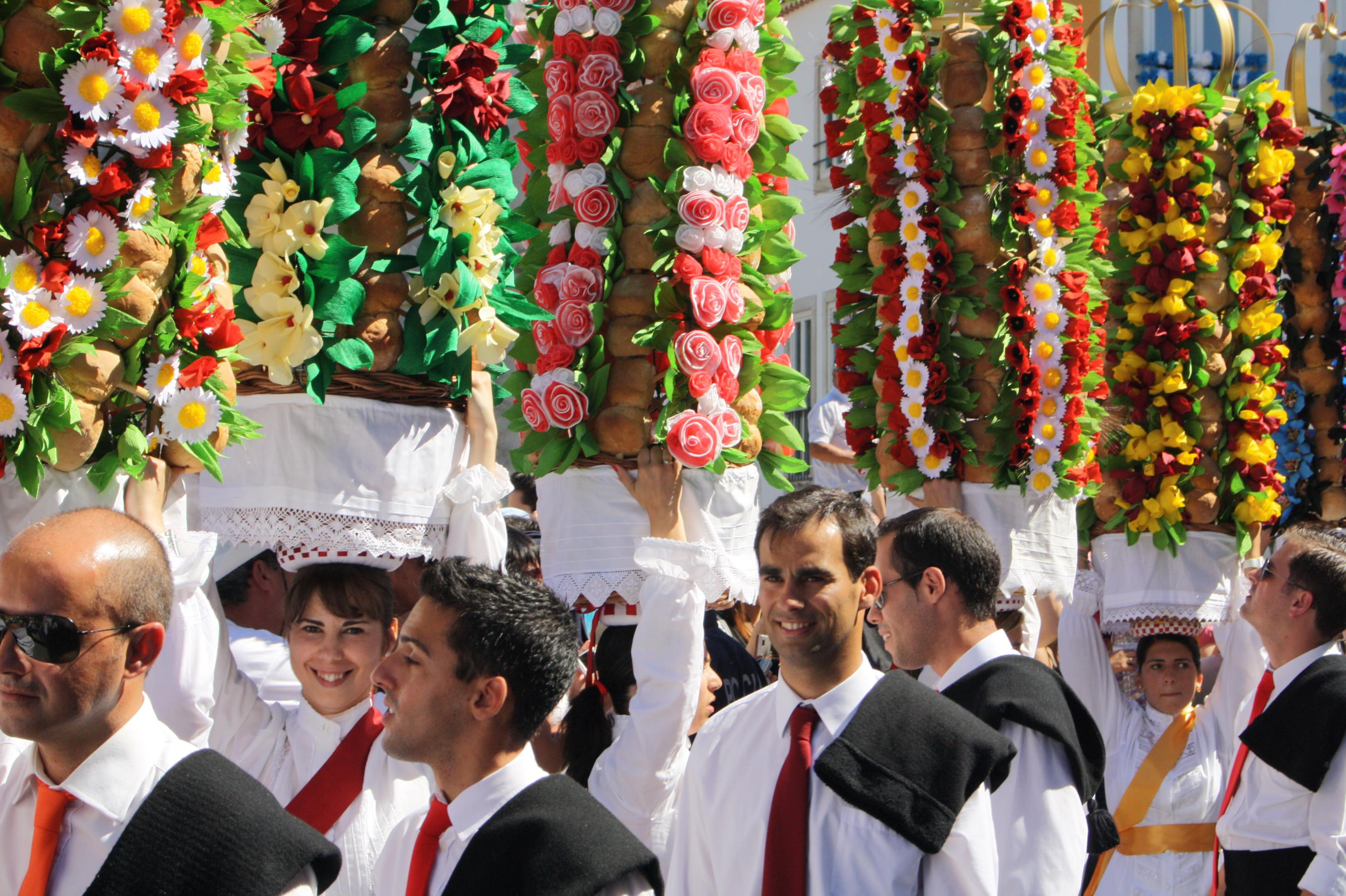 Festa dos Tabuleiros - Par com tabuleiro no desfile